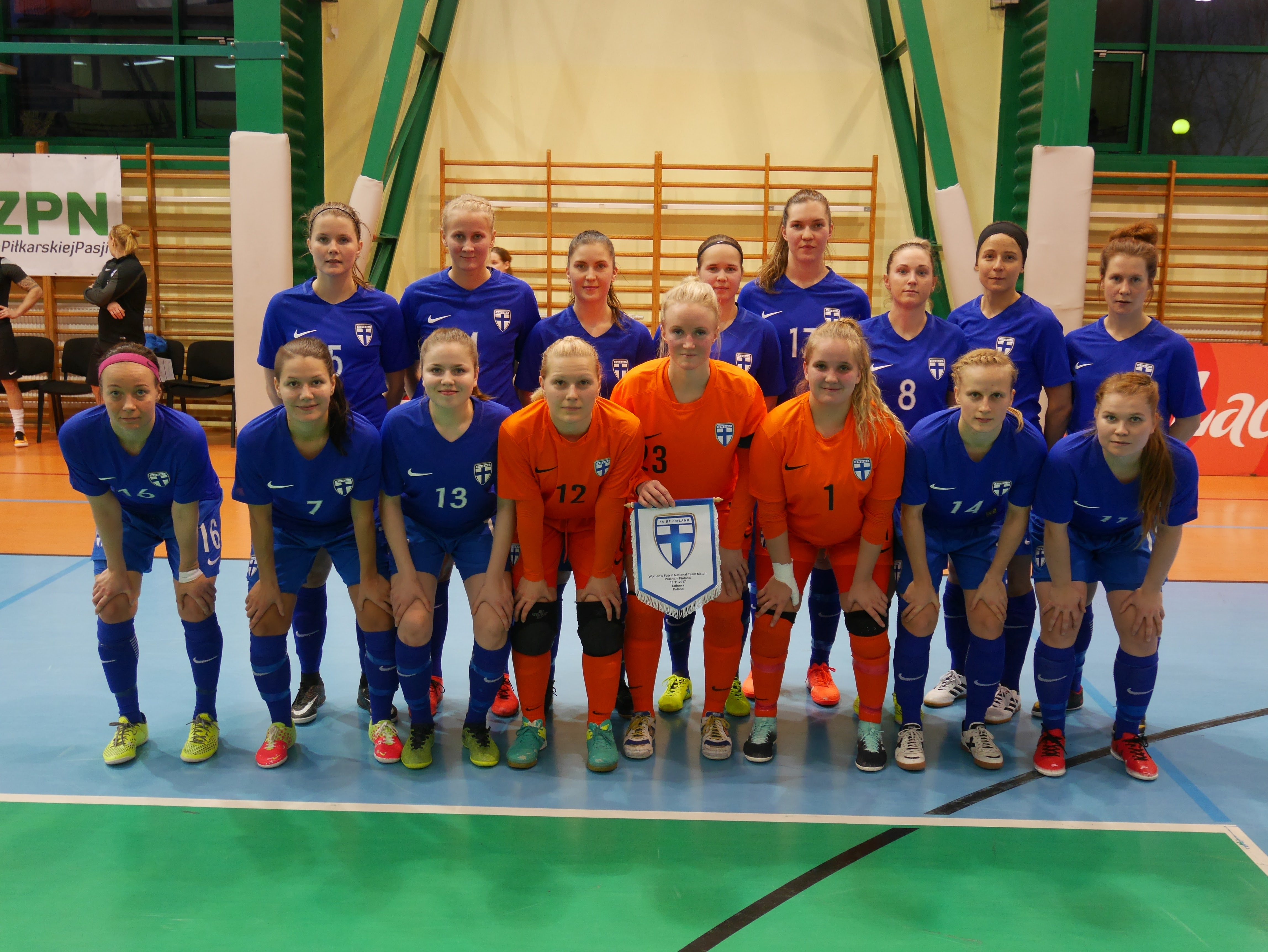 Suomen naisten futsalmaajoukkue ensimmäisessä maaottelussa marraskuussa 2017 Lubawassa, Puolassa. .